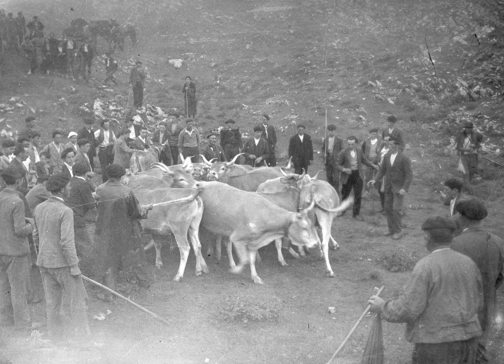 Tributo de las Tres Vacas. Eligiendo las vacas.